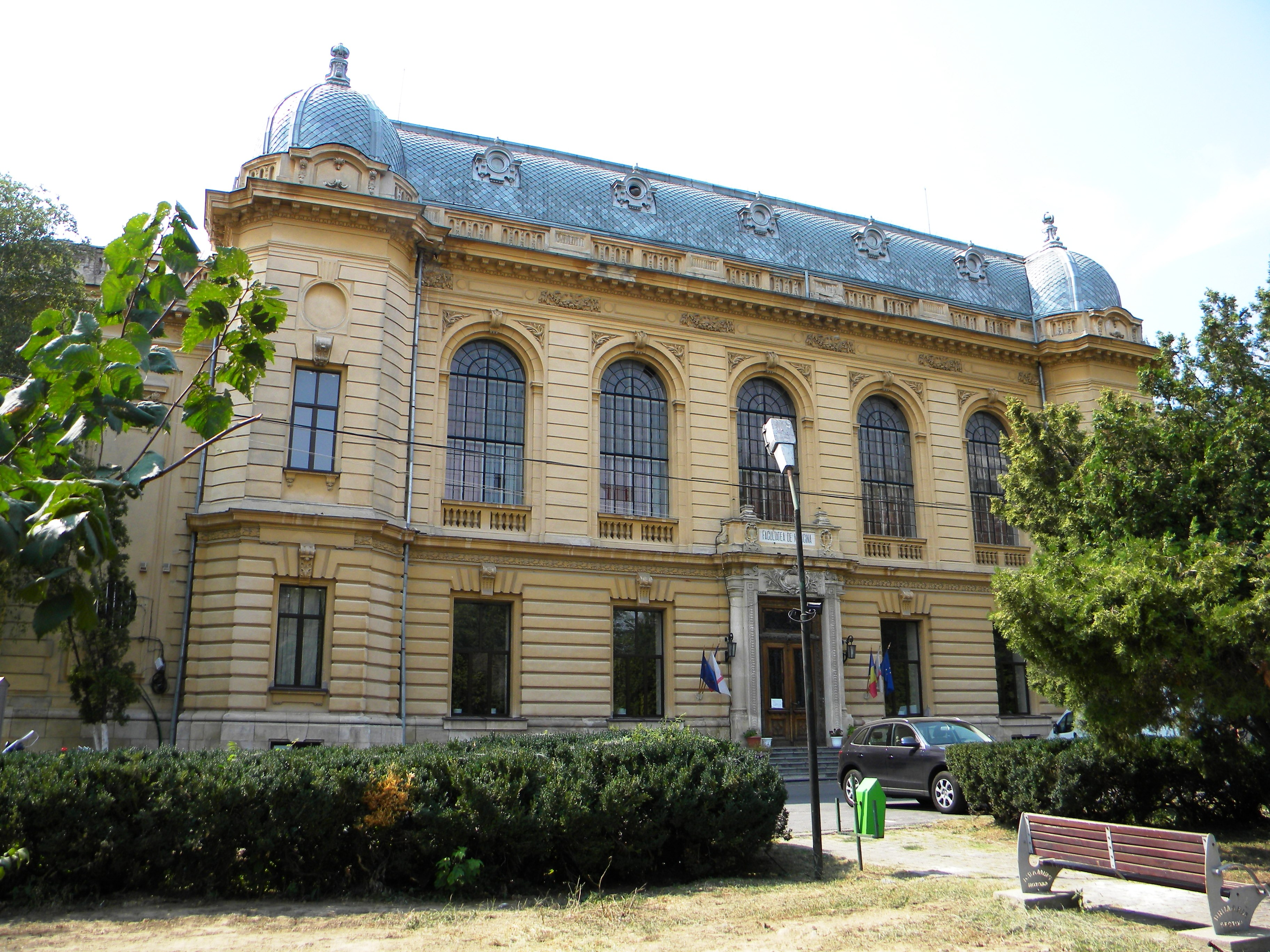 Fosta Facultate de Medicina azi Universitatea de Medicina si Farmacie, Bd. Eroii Sanitari nr. 8, sect. 5, Bucuresti (alta pozitie)